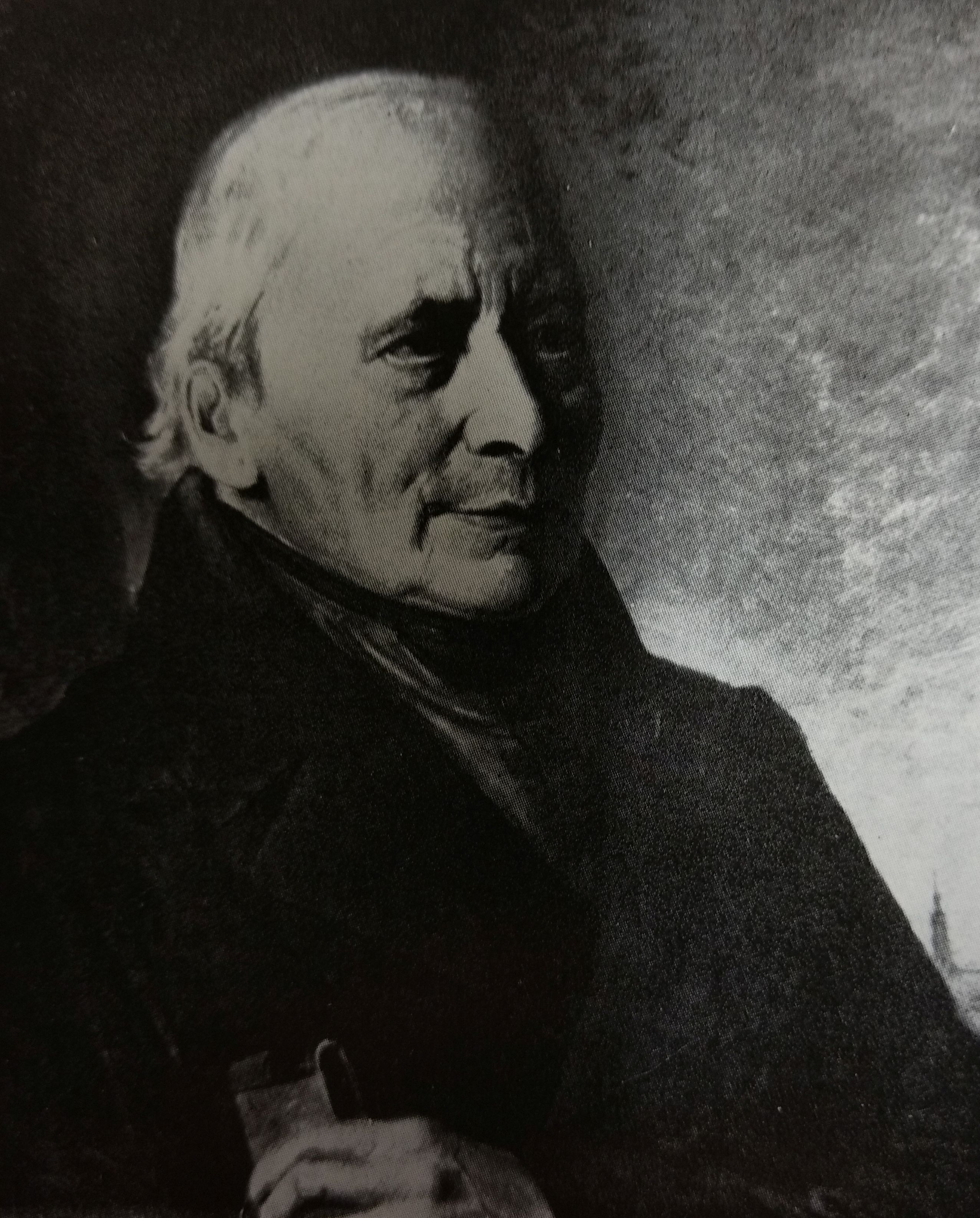 Jakob Salat (gest. 1851), Ölgemälde